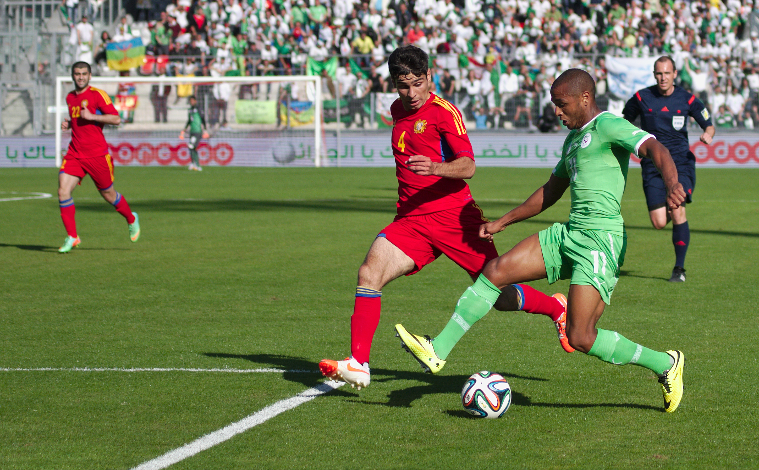 Algérie - Arménie - 20140531 - Yacine Brahimi (Alg) face à Taron Voskanyan (Arm).